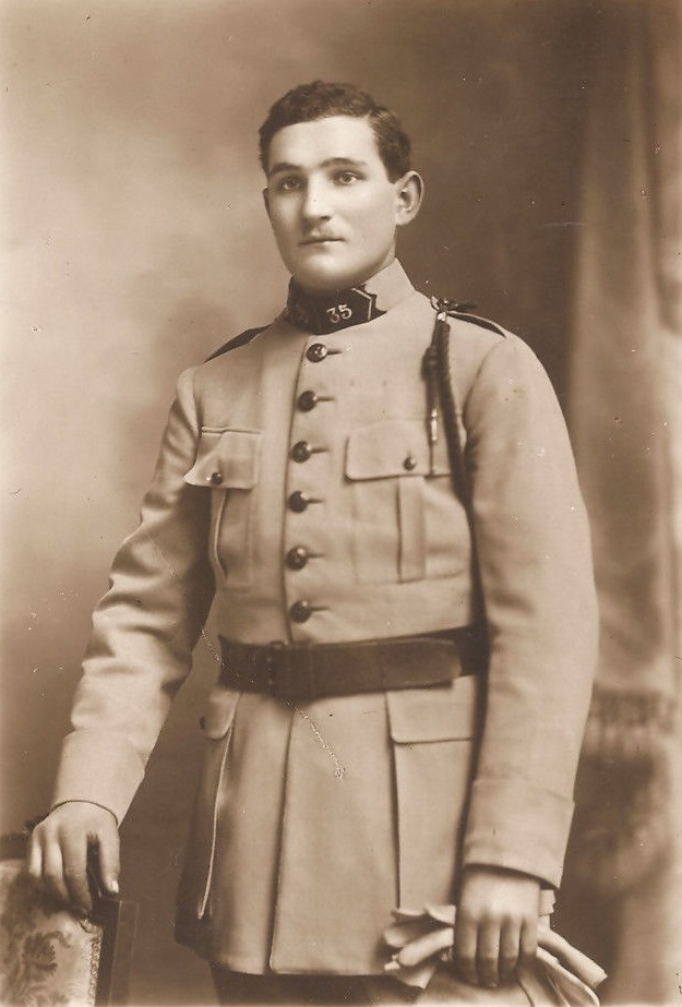 Le jeune soldat Joseph Darnand, incorporé le 8 janvier 1916 au 35ème régiment d'infanterie de Belfort. Darnand pose en belle tenue de sortie devant le photographe d'atelier de Belfort, selon un type de portrait sépia sur support carte postale.